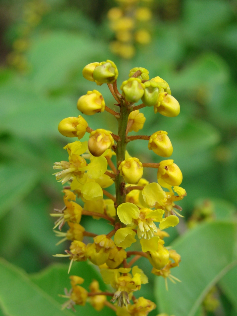 Byrsonima laxiflora - MALPIGHIACEAE Parque Estadual da Serra dos Pirineus - Pirenópolis - Goiás - Brasil.